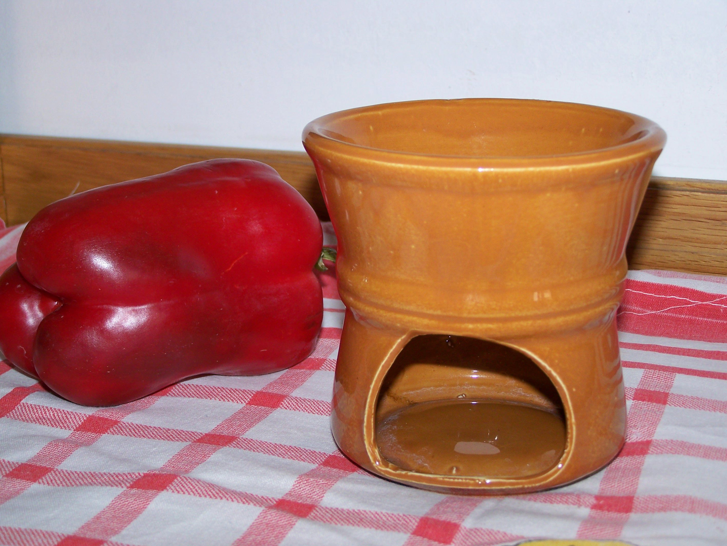 Autore:Madaki Tipico föiot per bagna caôda.